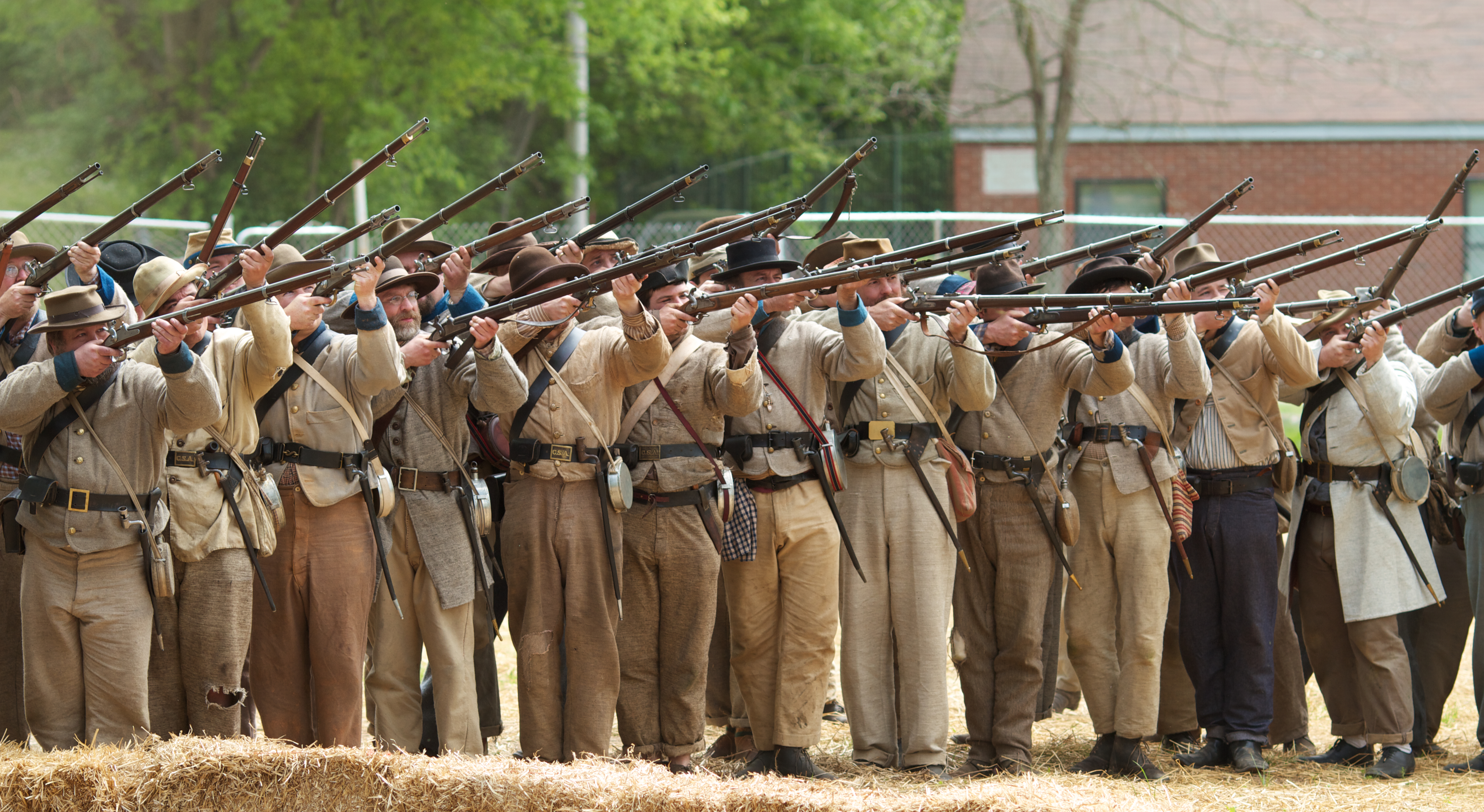 Carter House Gardens Franklin Battlefield Franklin, Tennessee